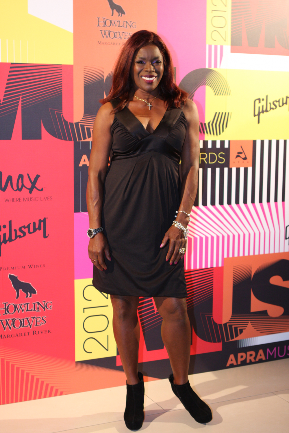 Marcia Hines 2012 APRA MUSIC AWARDS